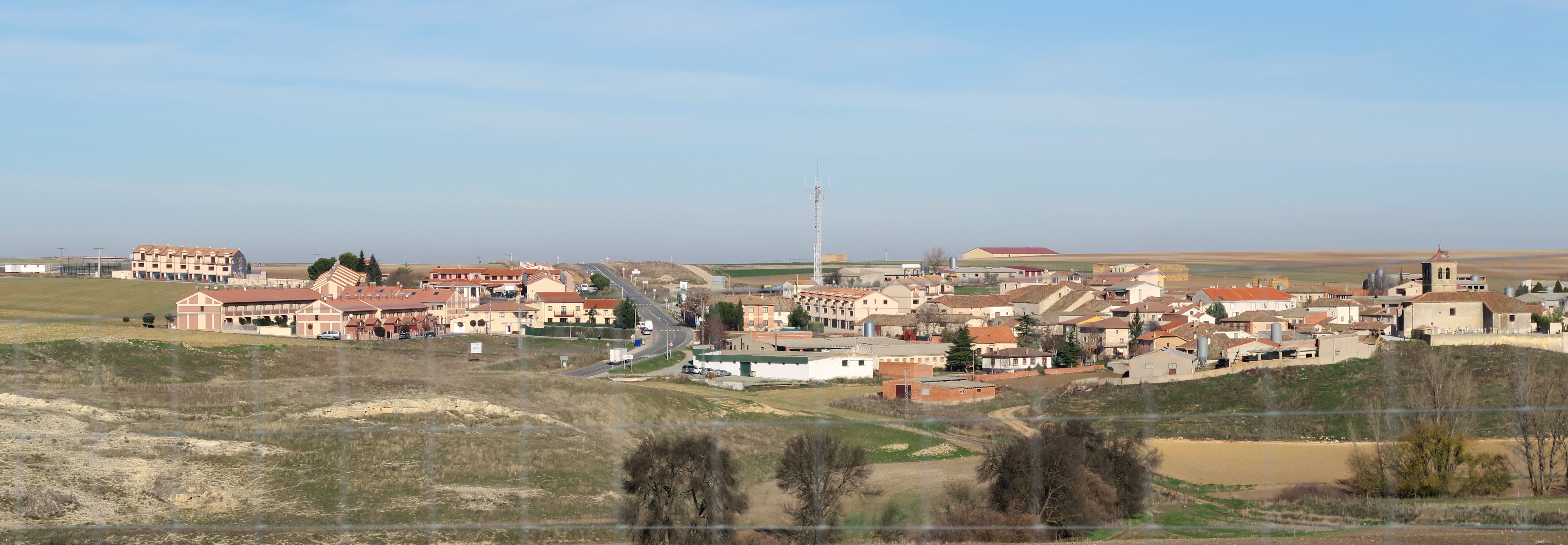 Roda de Eresma, desde A-601